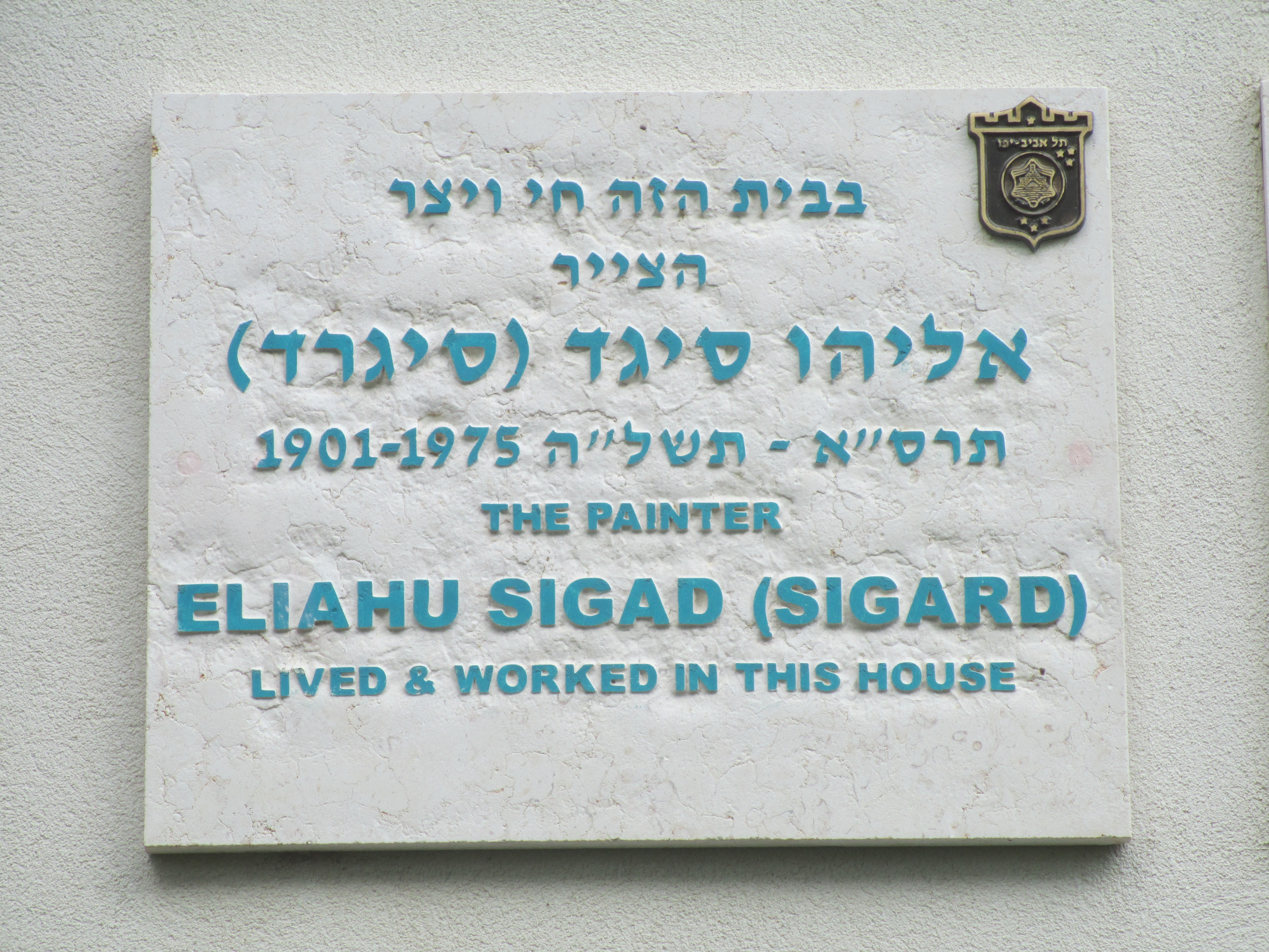 לוחית זיכרון לצייר אליהו סיגד (סיגרד) בתל אביב